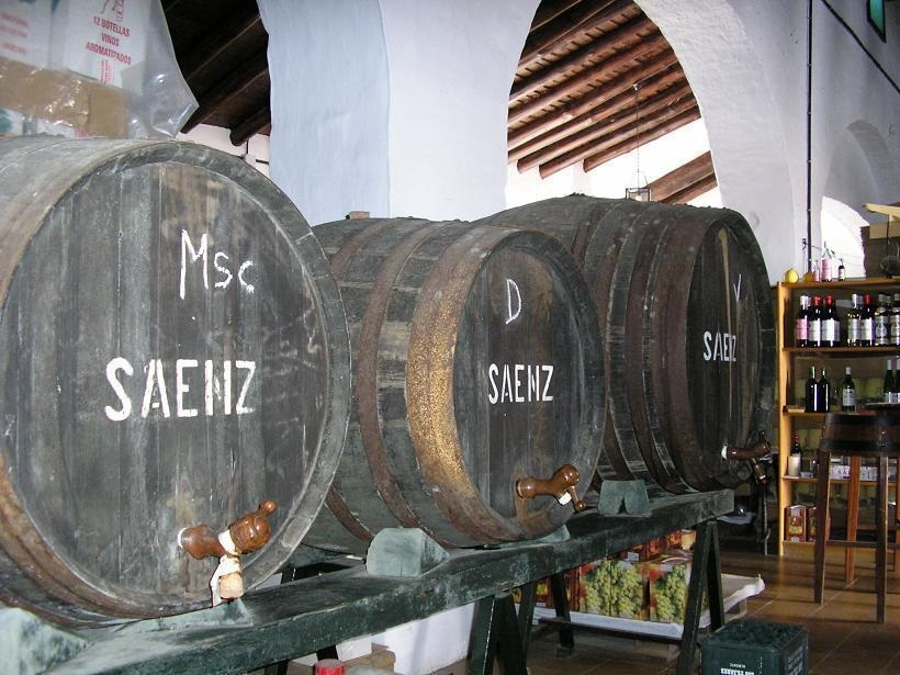 Bodegas Melquiades Saenz